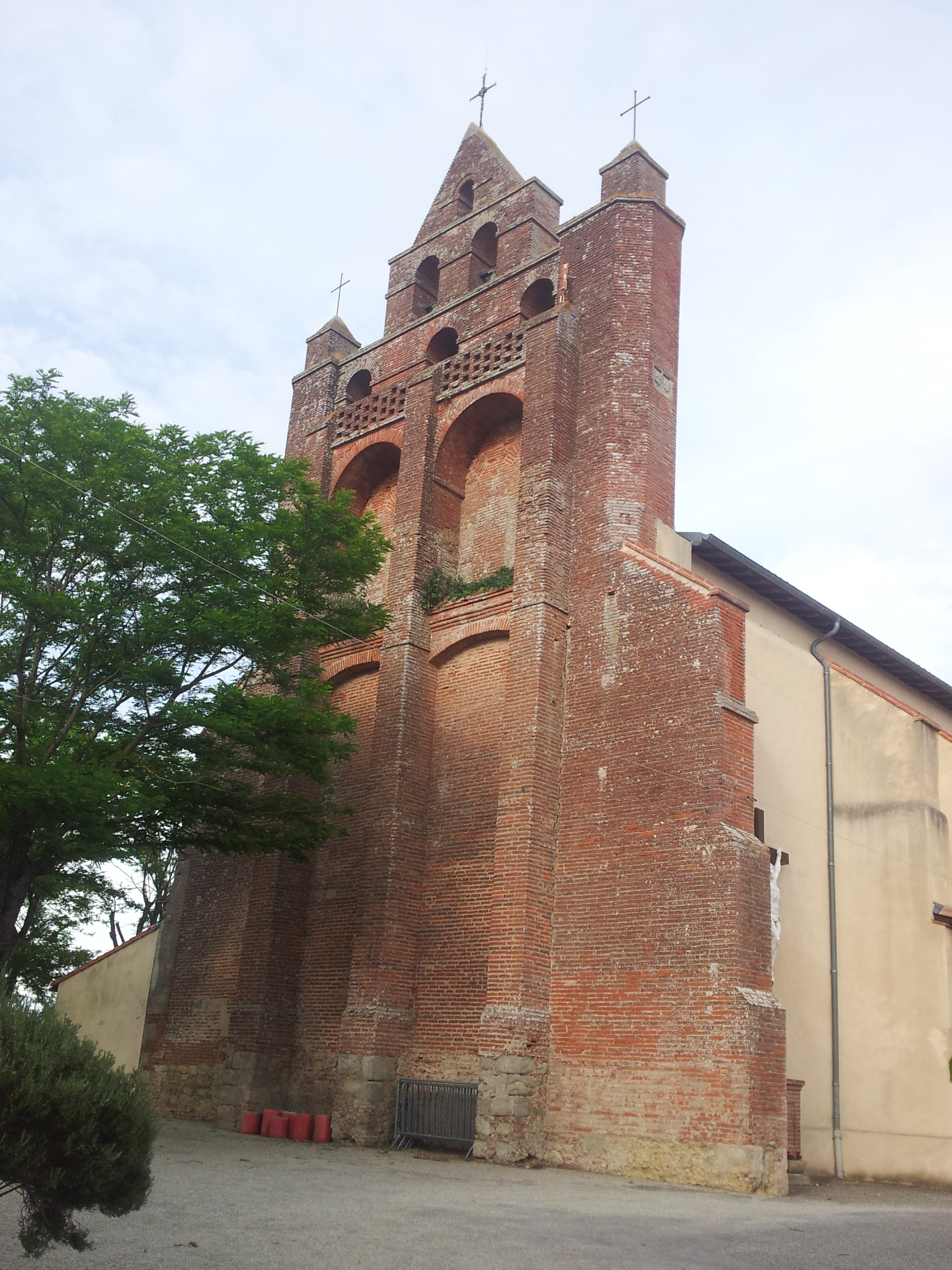 Eglise Saint Etienne de Caignac